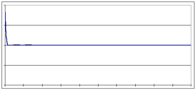 Eigen werk